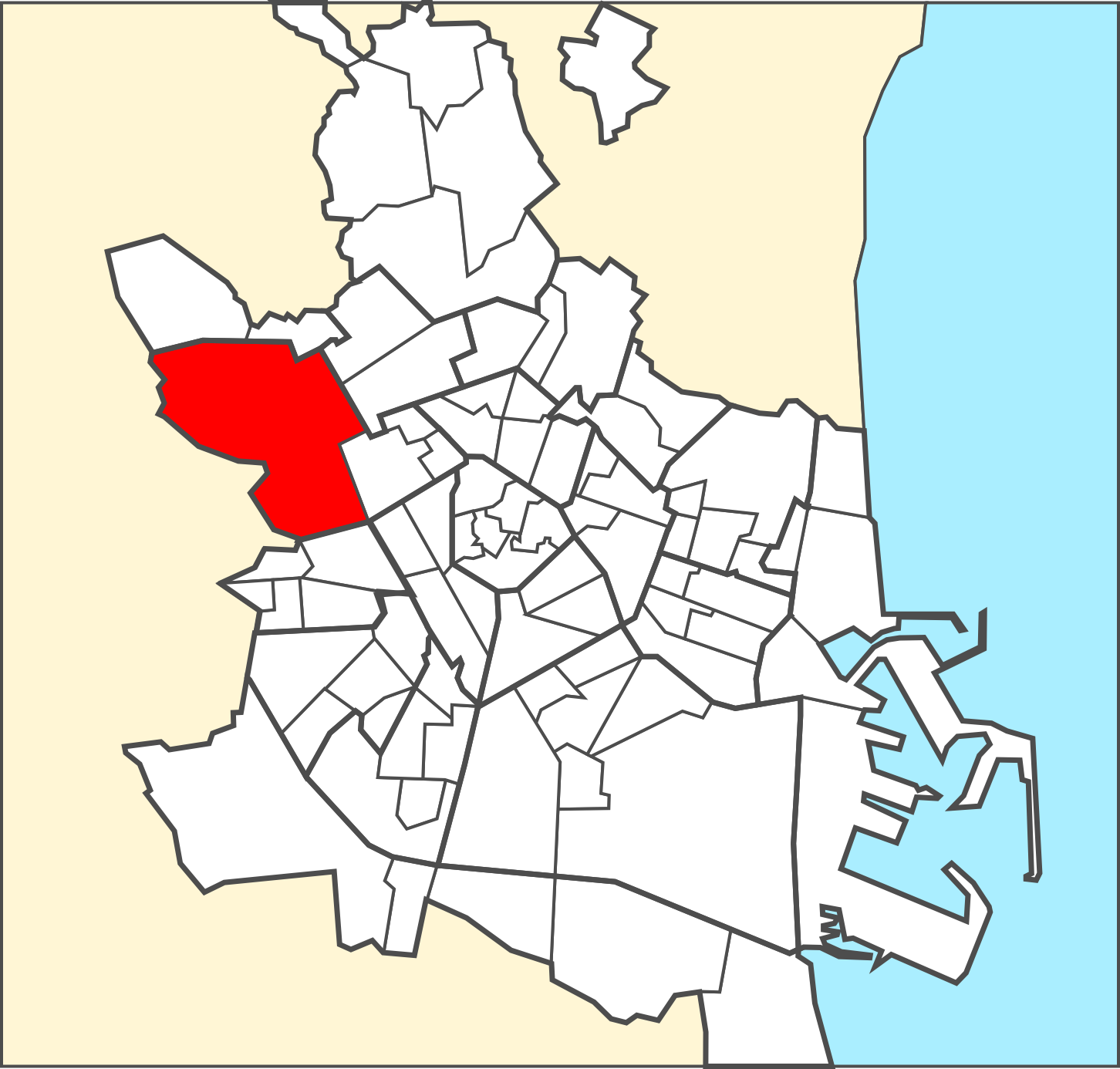 Localització del barri dins de la ciutat de València.